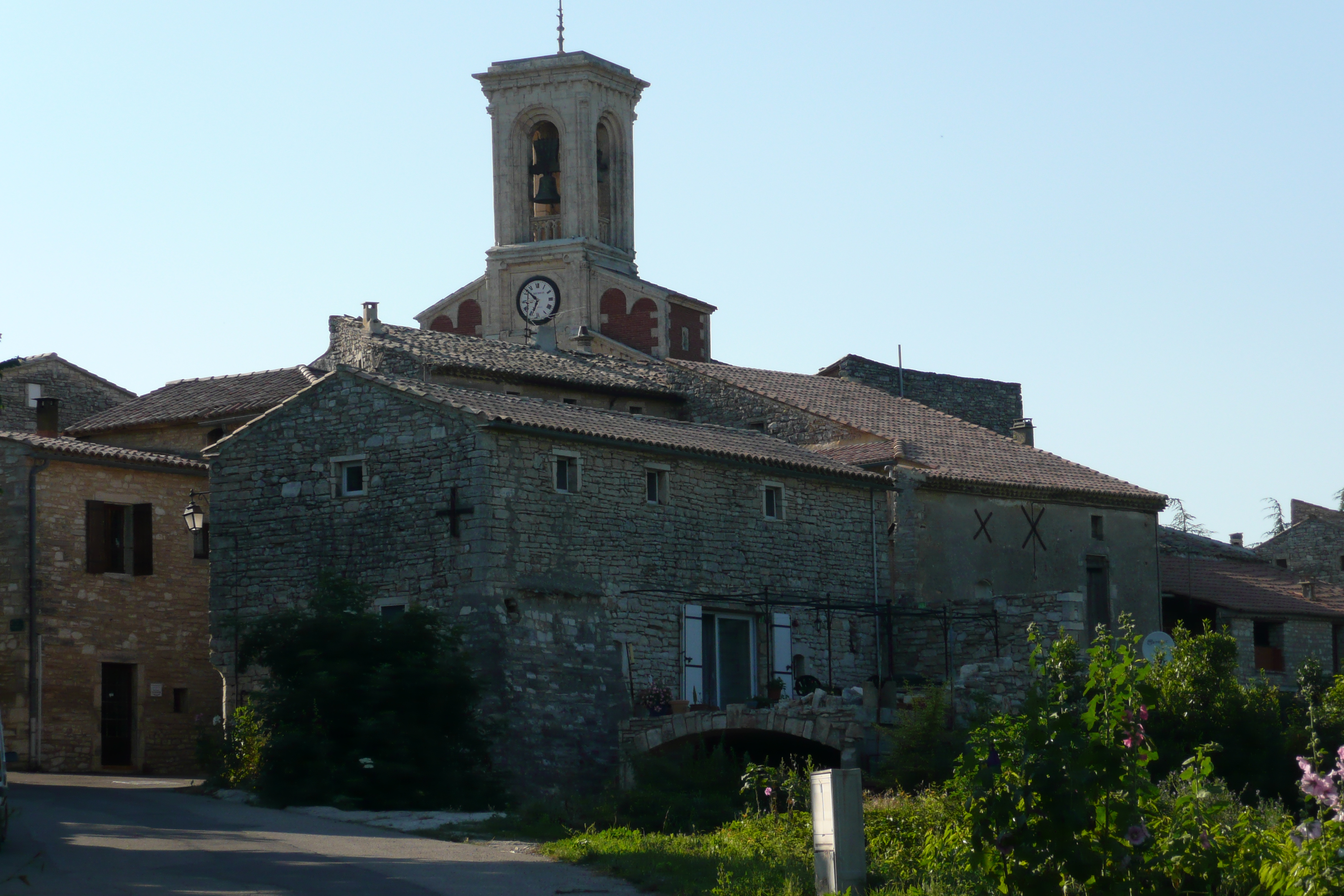 Eglise à Le Garn.